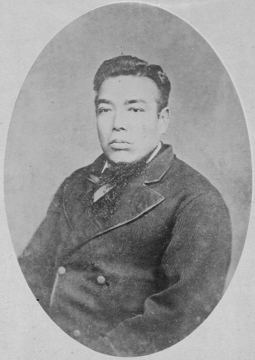 三島通庸の肖像写真